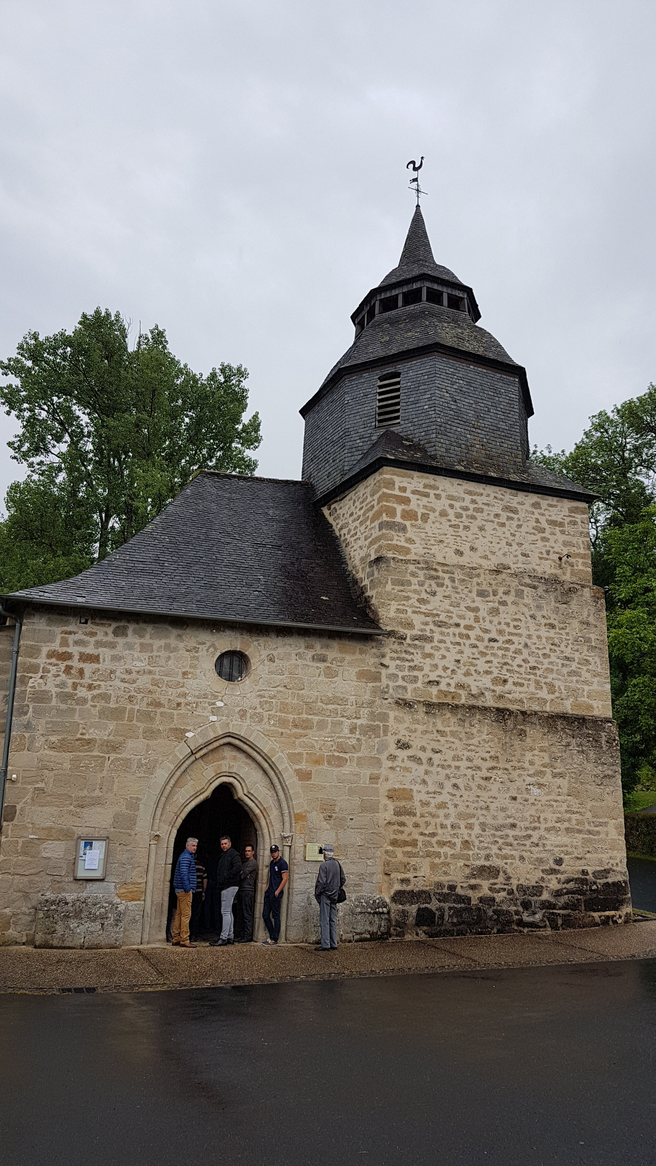 Façade de l'église Saint Namphaise de La Chapelle-aux-Saints, avec son clocher octogonal à trois étages et son portail trilobé de style limousin